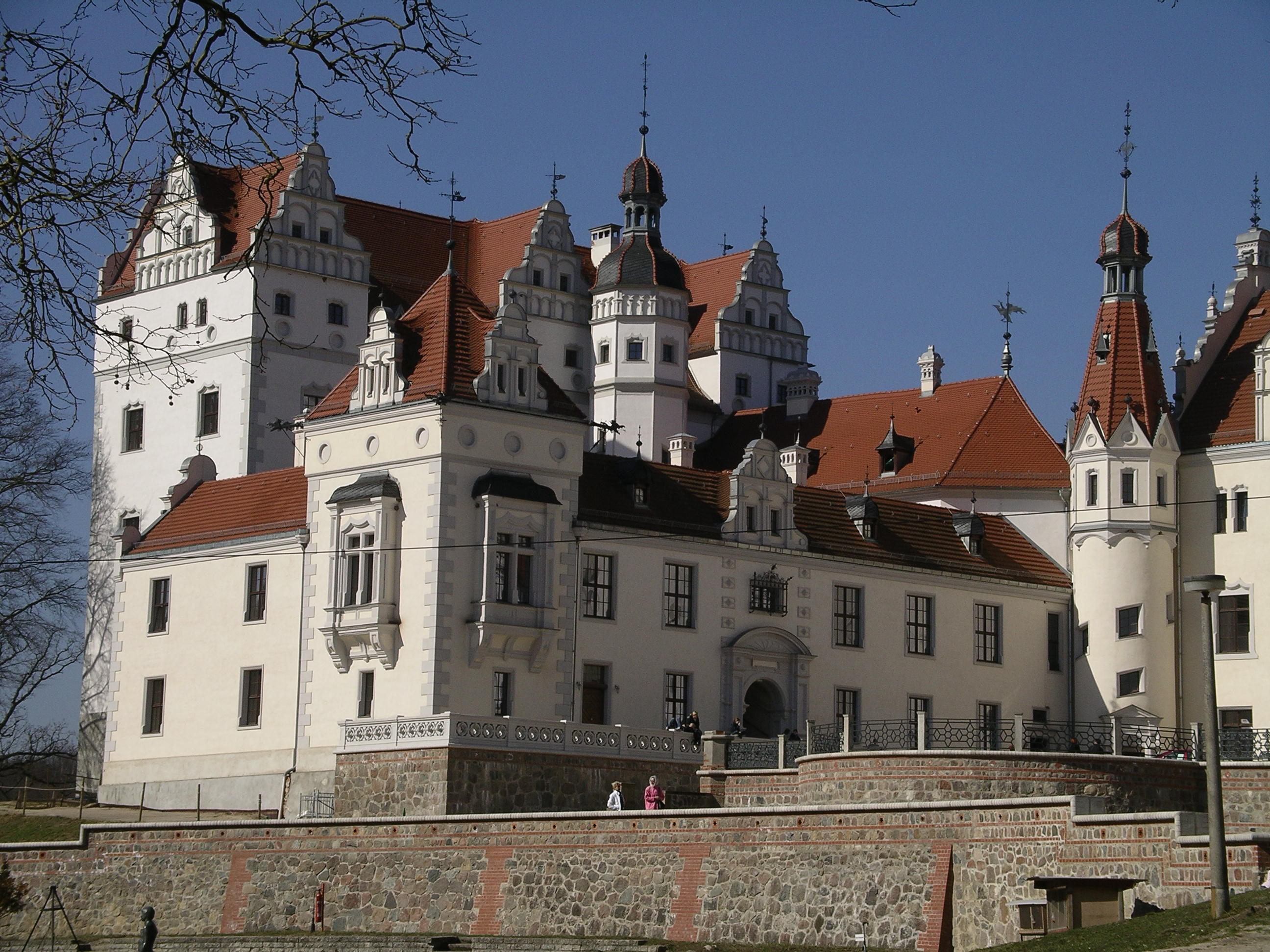 Schloss Boitzenburg in der Uckermark, Zoom linker Fluegel